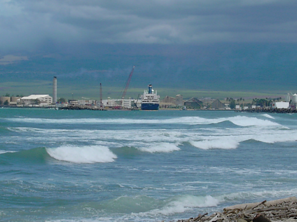 Kahului Bay, Kahului, Hawaii.